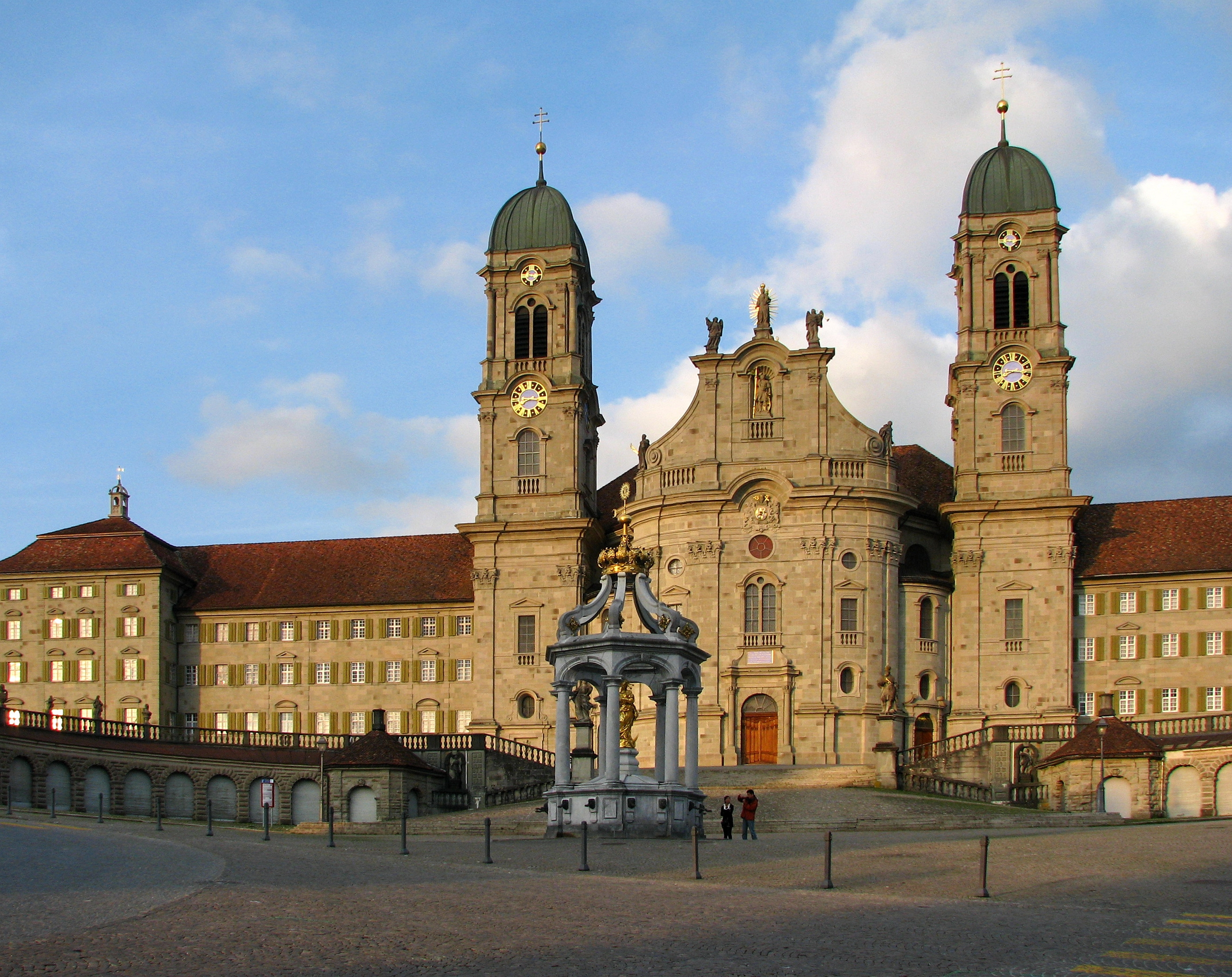 Abbey church in Einsiedeln (SZ) in Switzerland